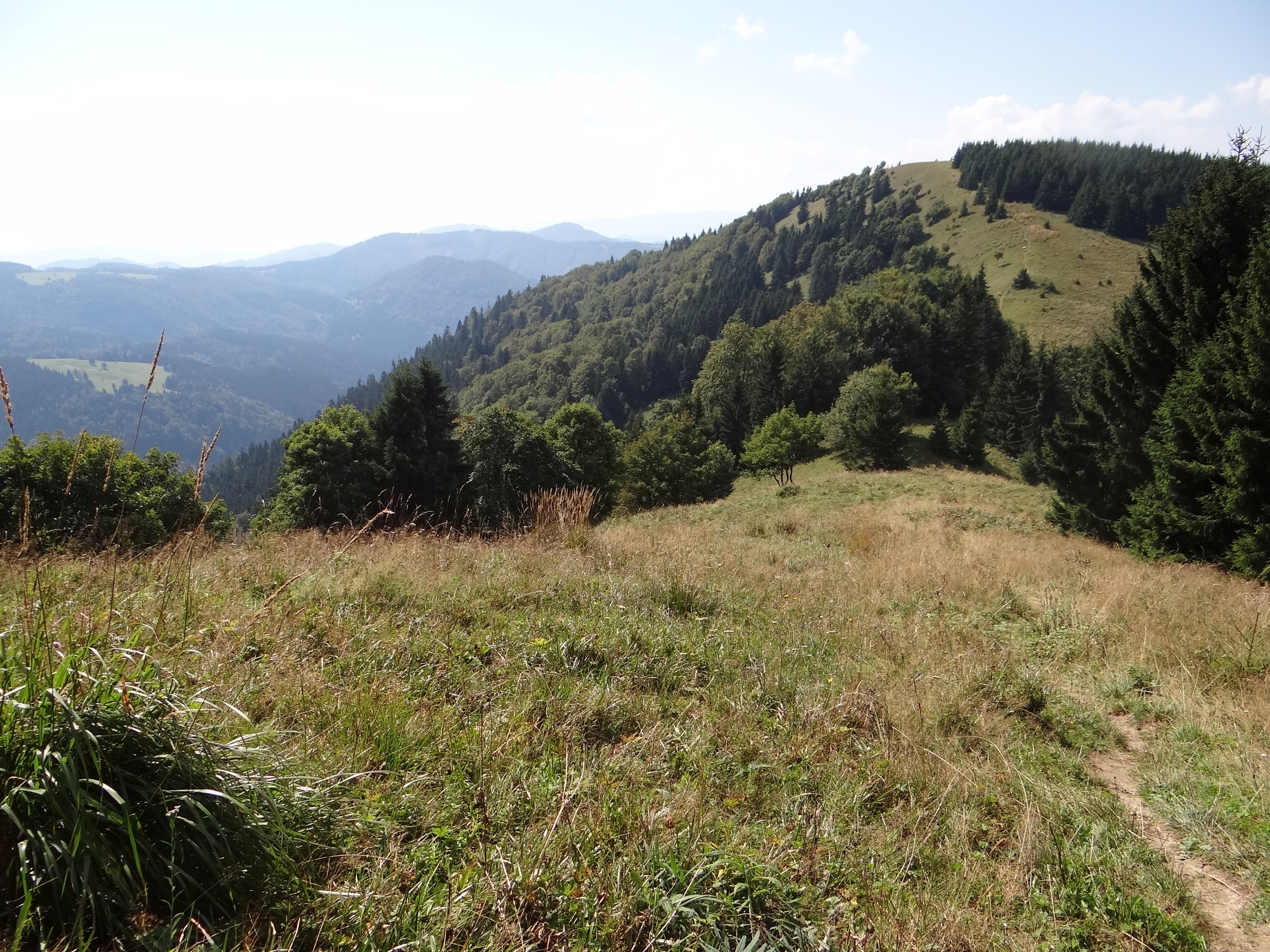 Sedlo Prípo, Motyčská hoľa